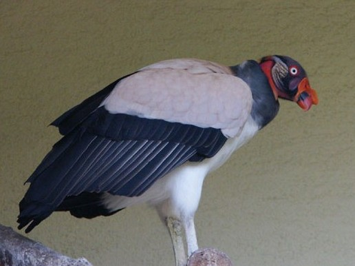 Königsgeier (Sarcoramphus papa)